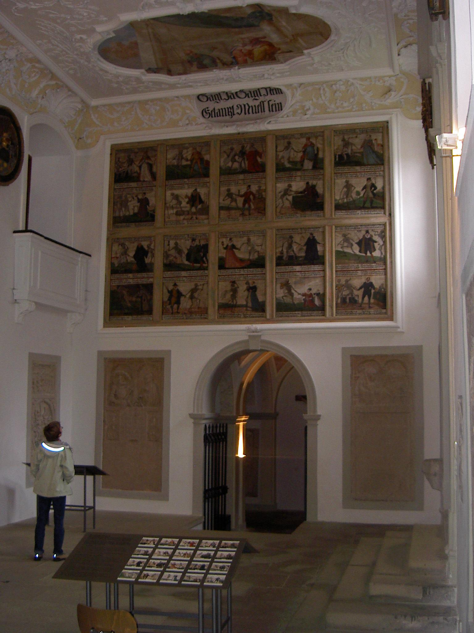 Inneres der St.-Anna-Kapelle in Füssen mit dem Totentanz von Jakob Hiebeler